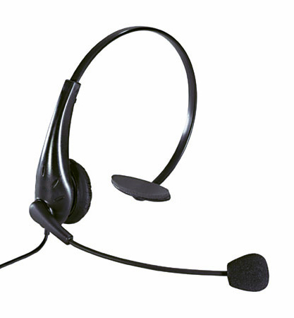 Casque monophonique pour opérateur téléphonique